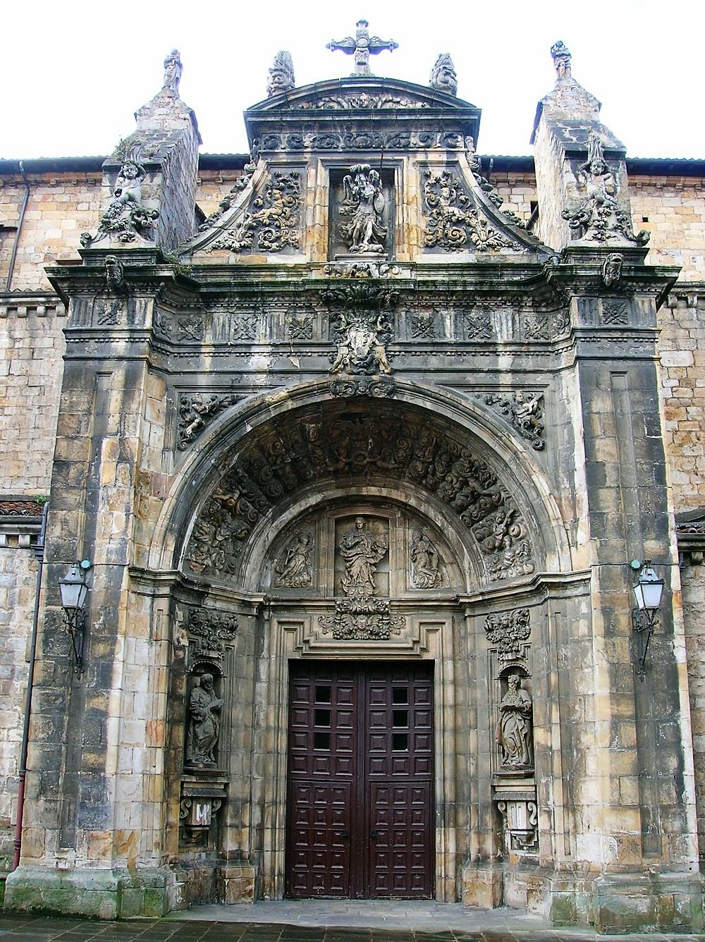 Portada barroca de la Iglesia de San Miguel Arcángel, Oñate (Guipúzcoa)